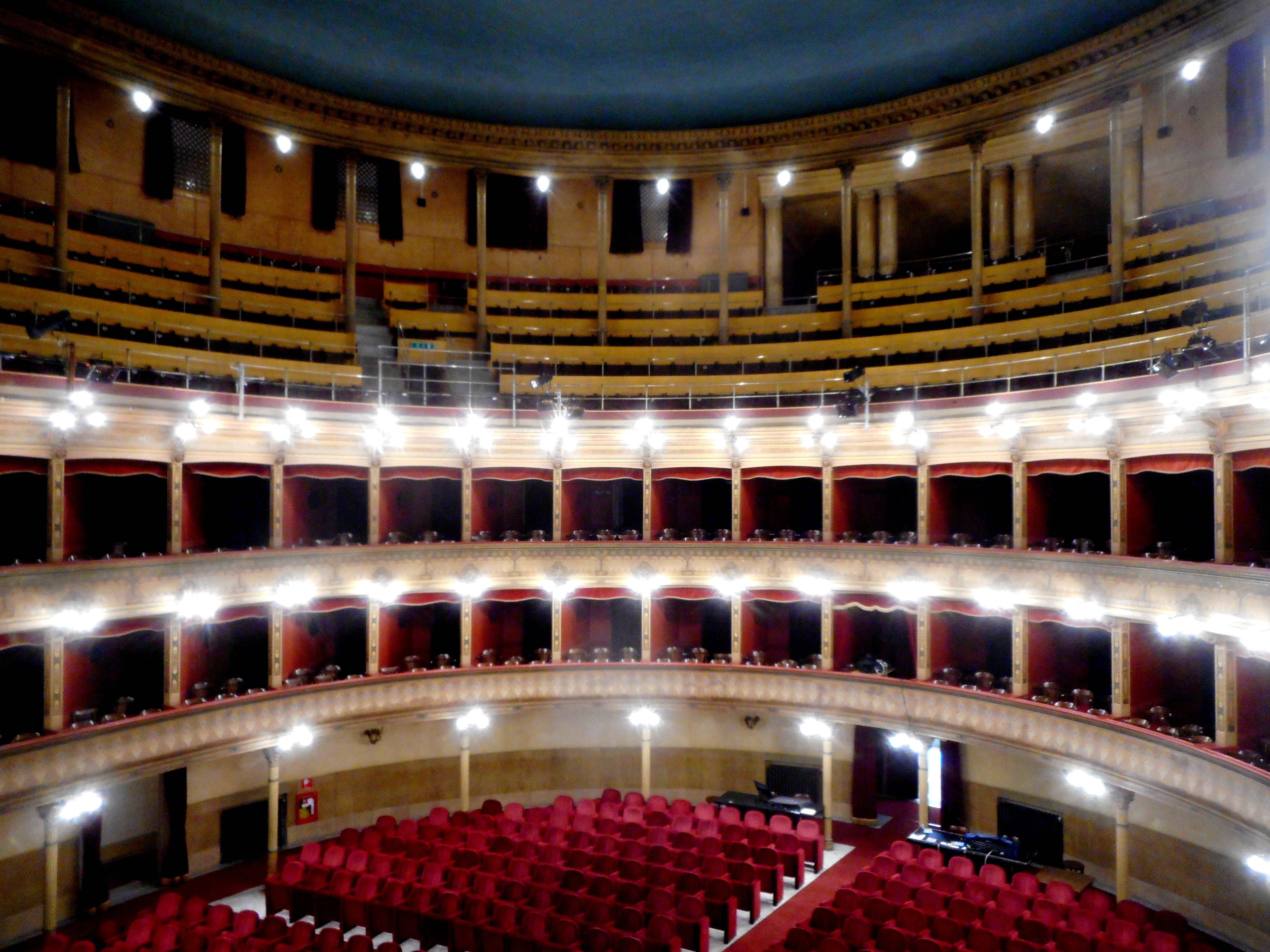 Sala del Teatro Biondo vista dal loggione